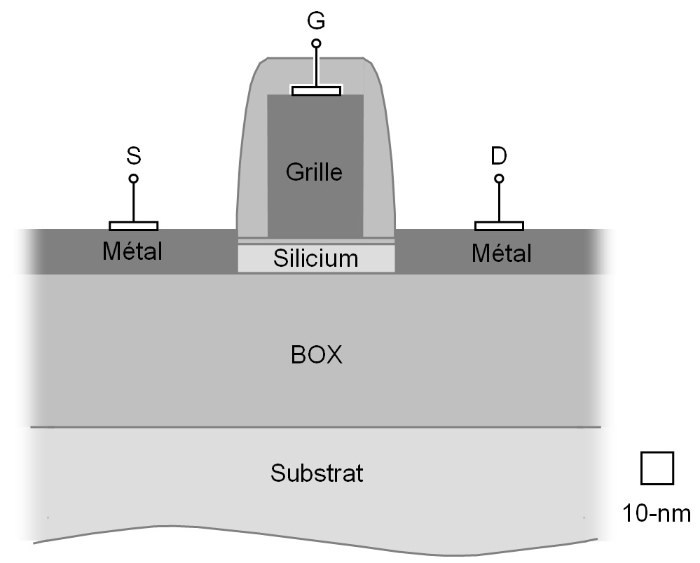 Transistor à Barrières Schottky sur substrat SOI à film ultra fin et non intentionnellement dopé.